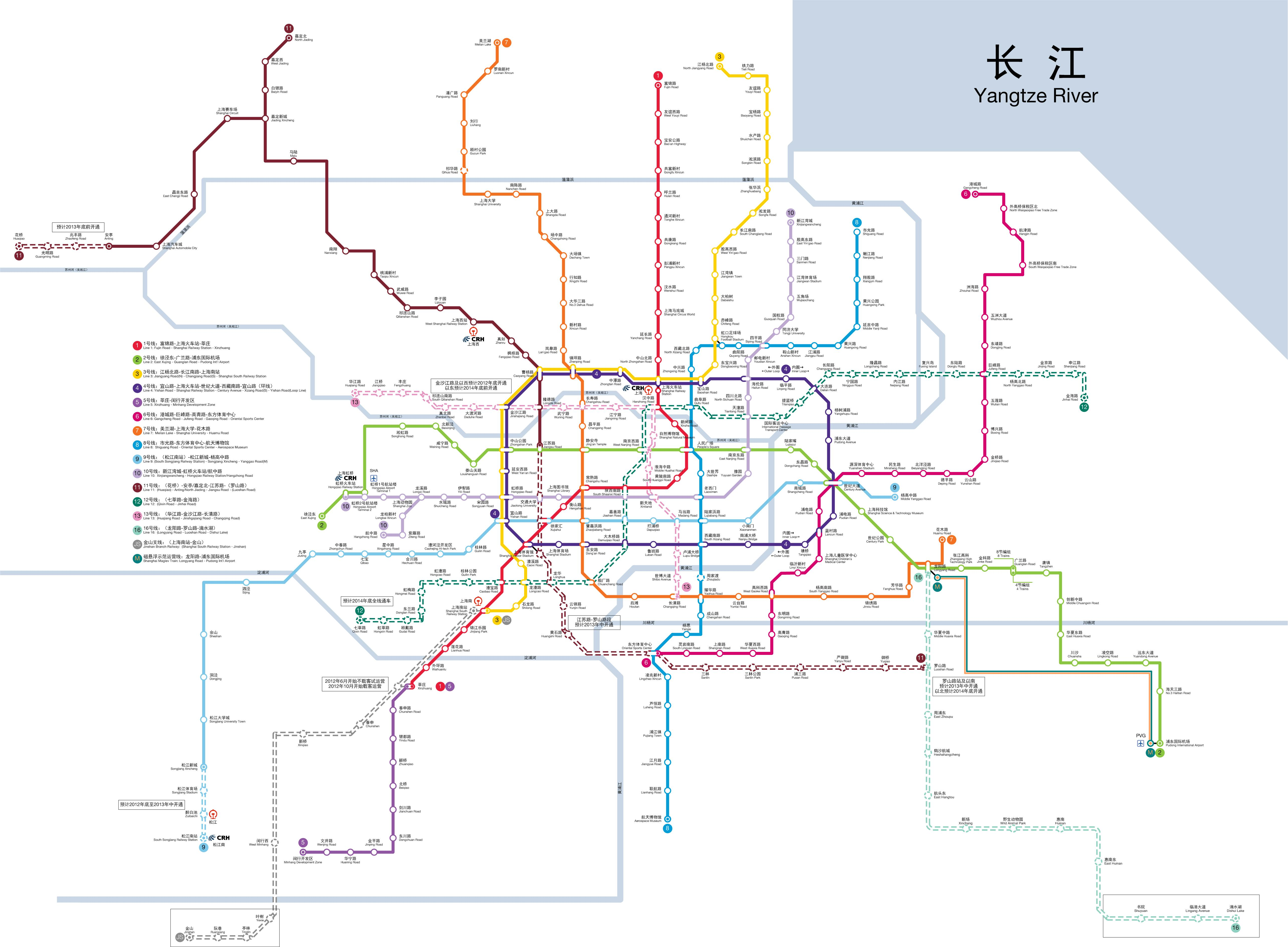 上海地铁线路图，标示目前运营中线路及2014年底开通的线路。